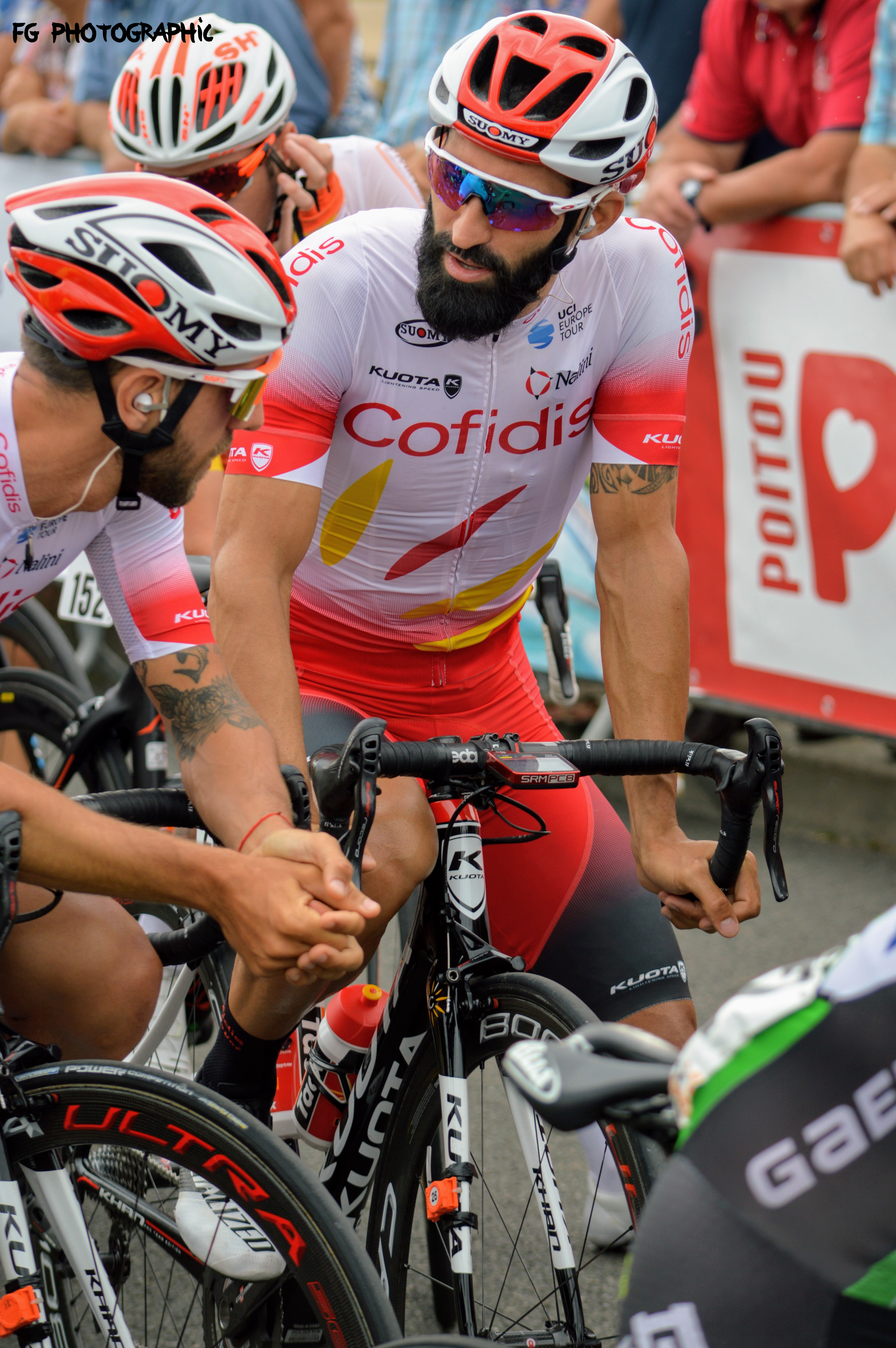 Geoffrey SOUPE - Août 2019 sur le Tour Poitou-Charentes